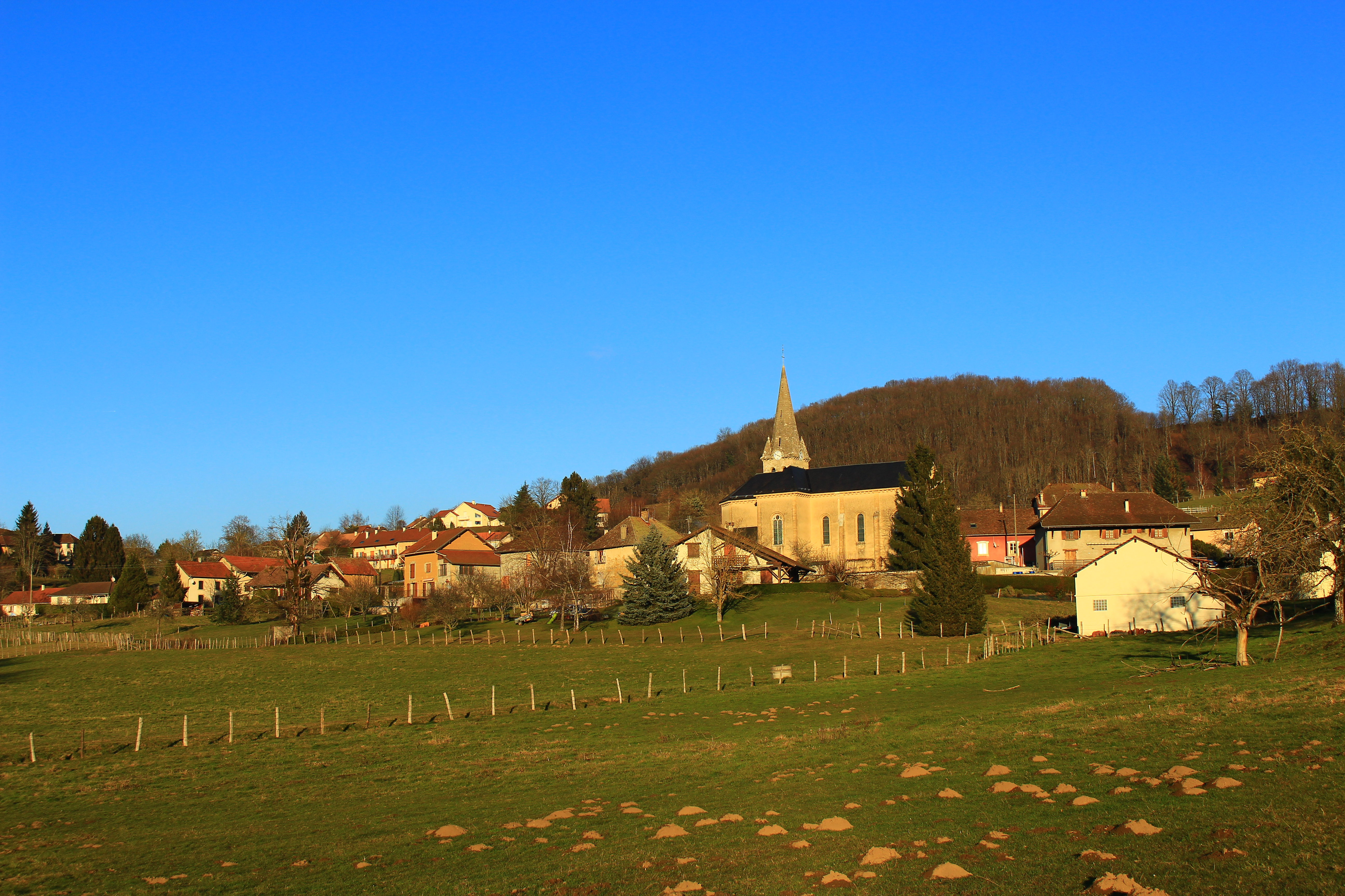 Le Bourg de Saint-Sulpice-des-Rivoires (Isère, France). Janvier 2017